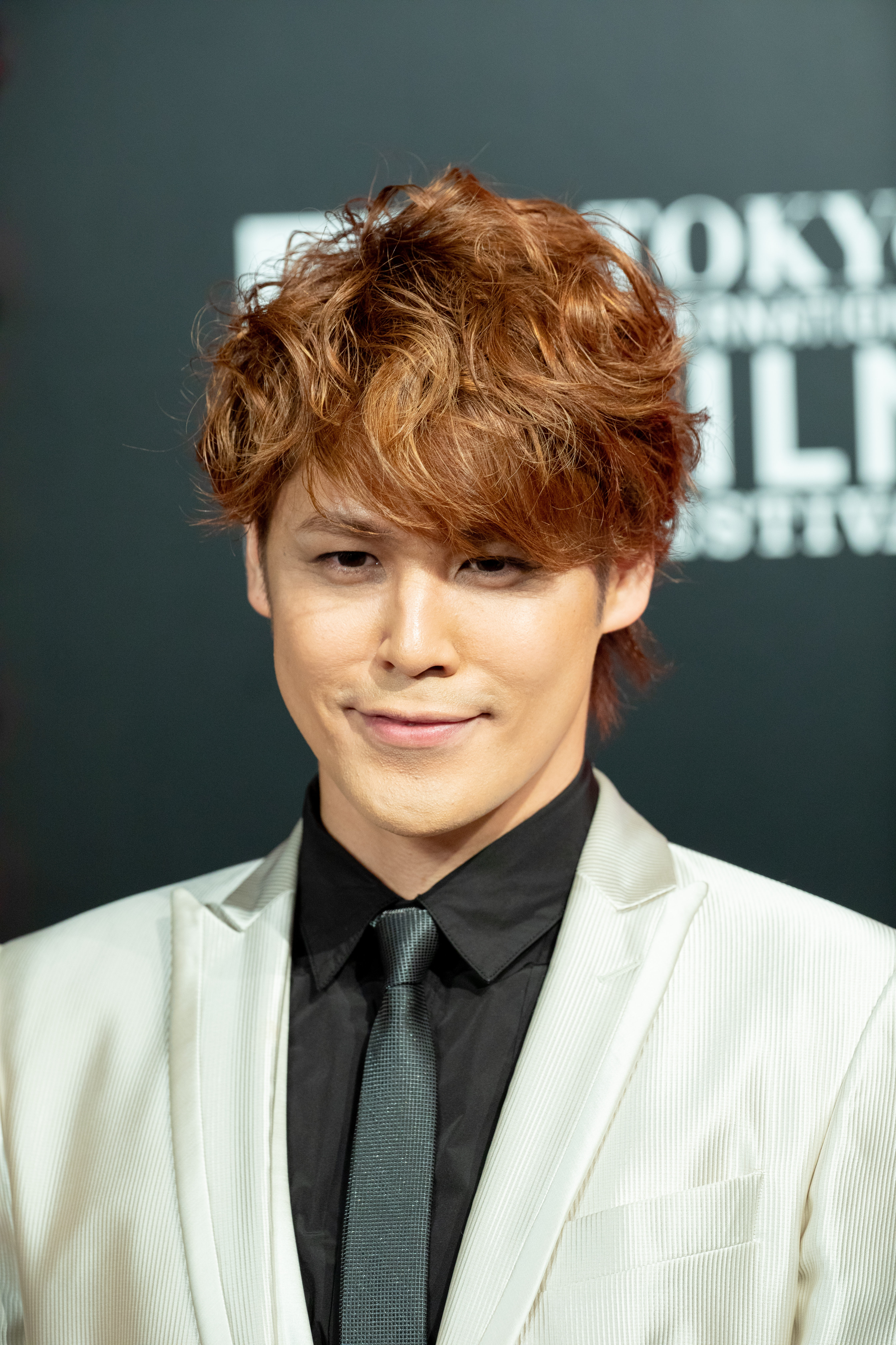 第30回 東京国際映画祭 オープニングセレモニー 宮野真守 (GODZILLA 星を喰う者)